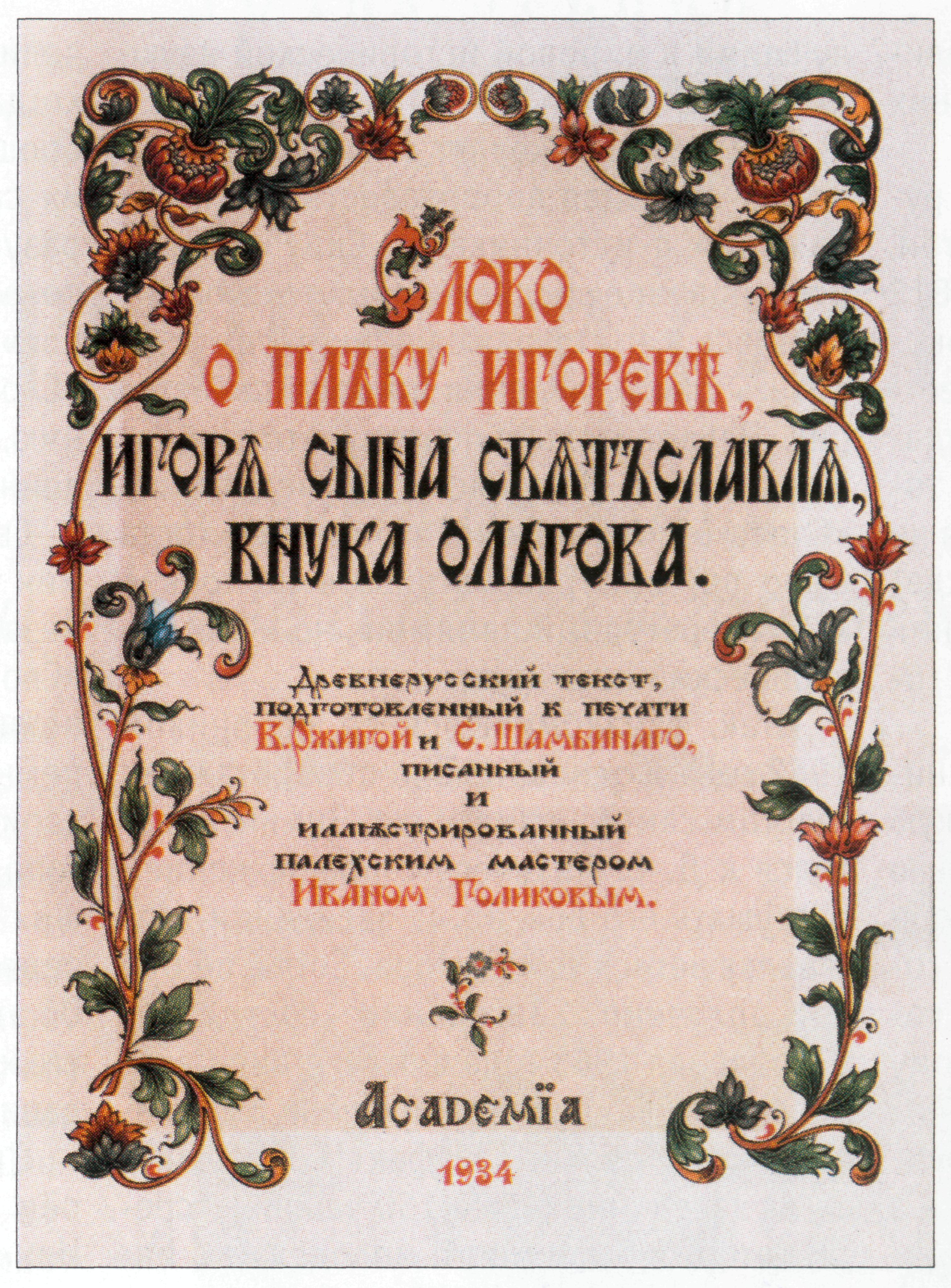 Титульный лист "Слова о полку Игореве". Гос. изд-во Академия. Палехское оформление.